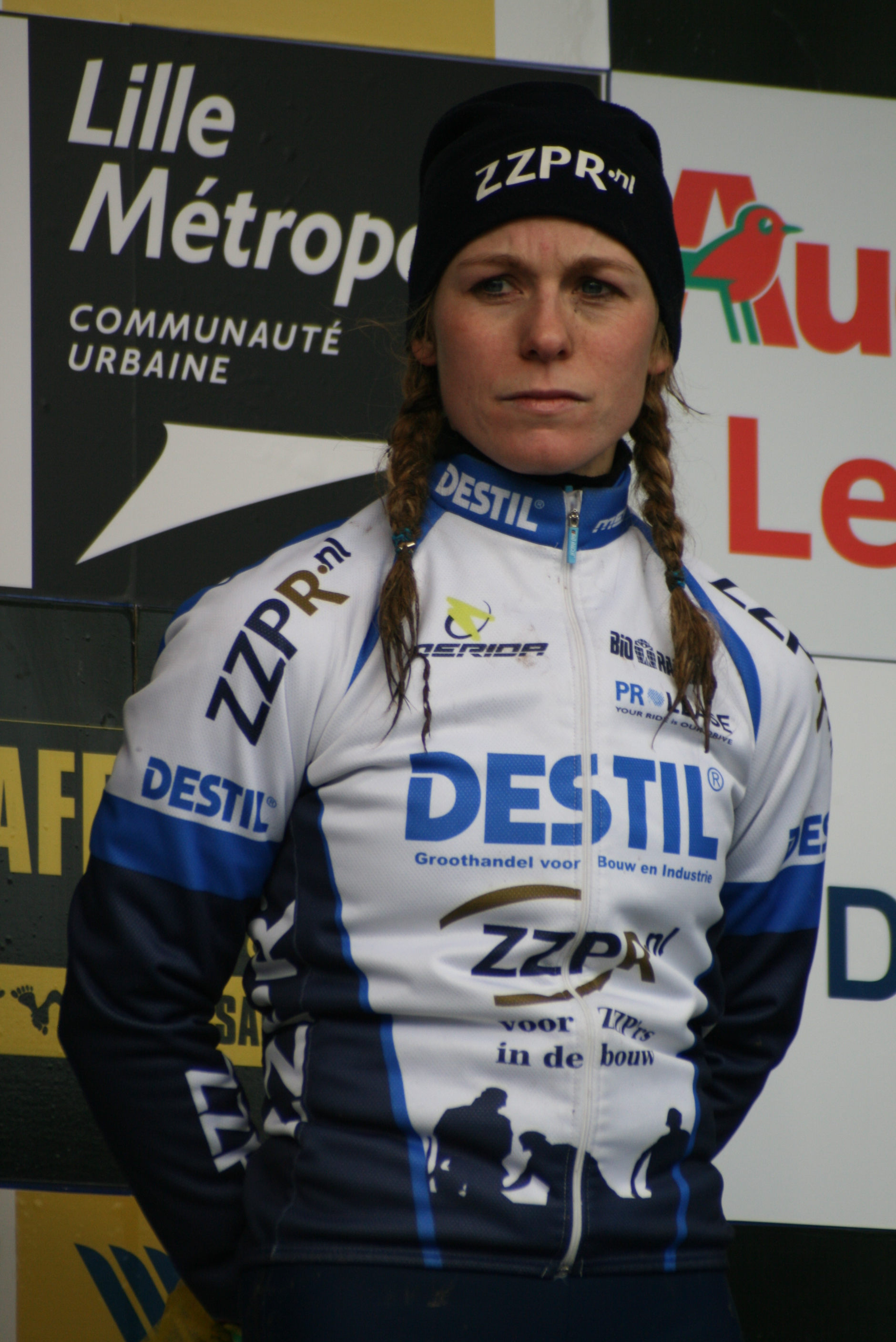 Daphny van den Brand, au cyclo-cross de Roubaix